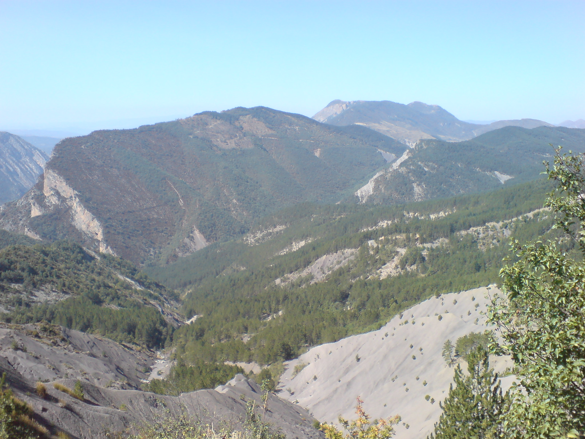 Montagne de la Gourrée, 1286 m au sommet